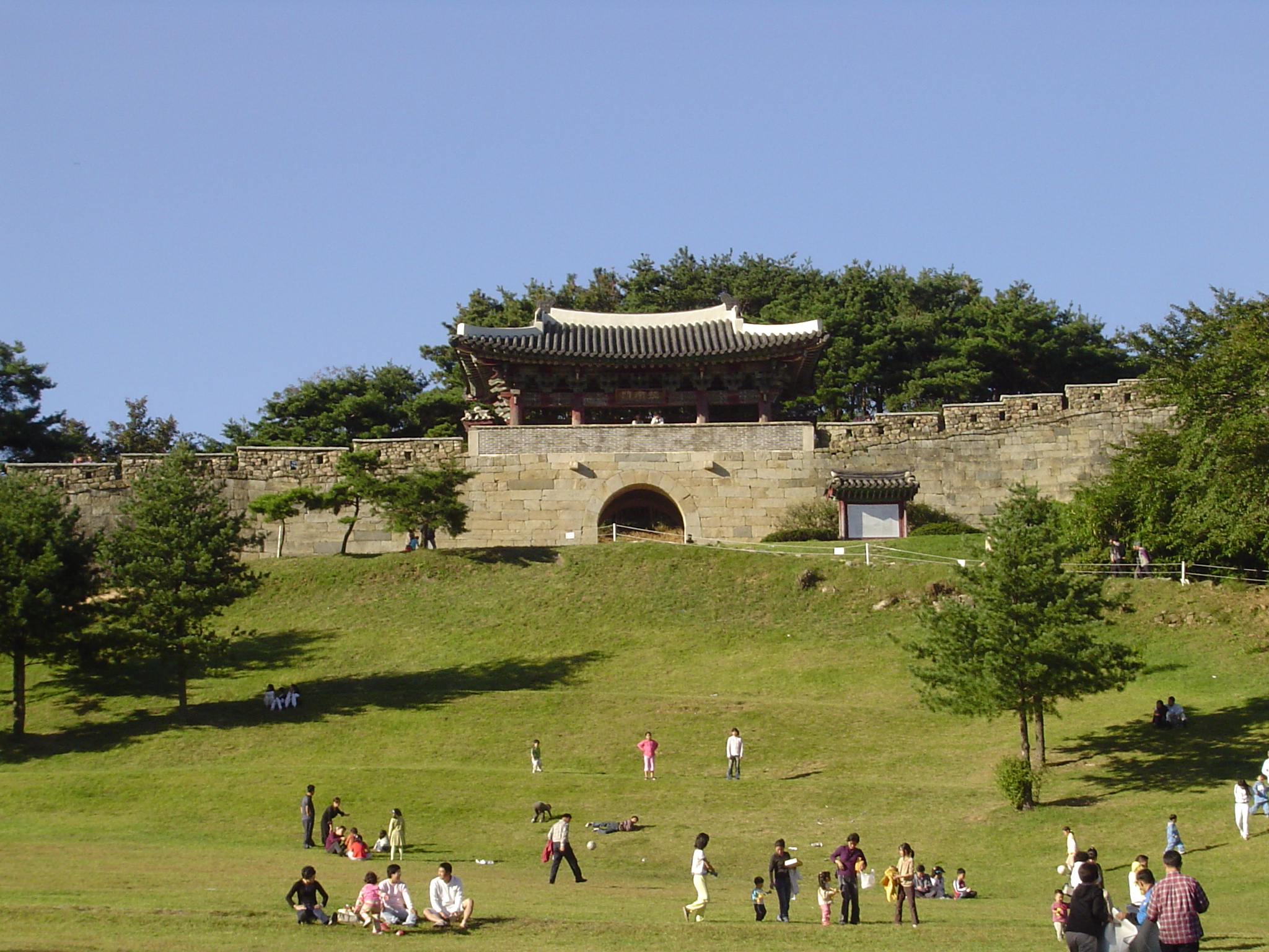 Sangdangsanseong Mountain Fortress